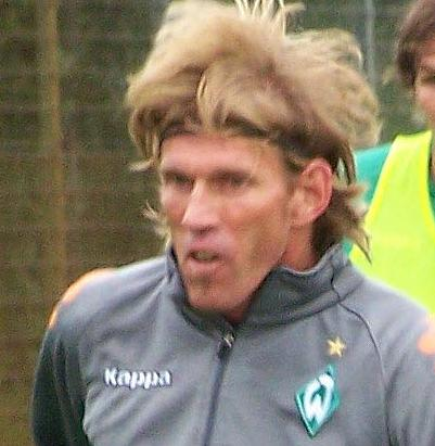 Michael Kraft beim Training - Ausschnitt des Gesichts